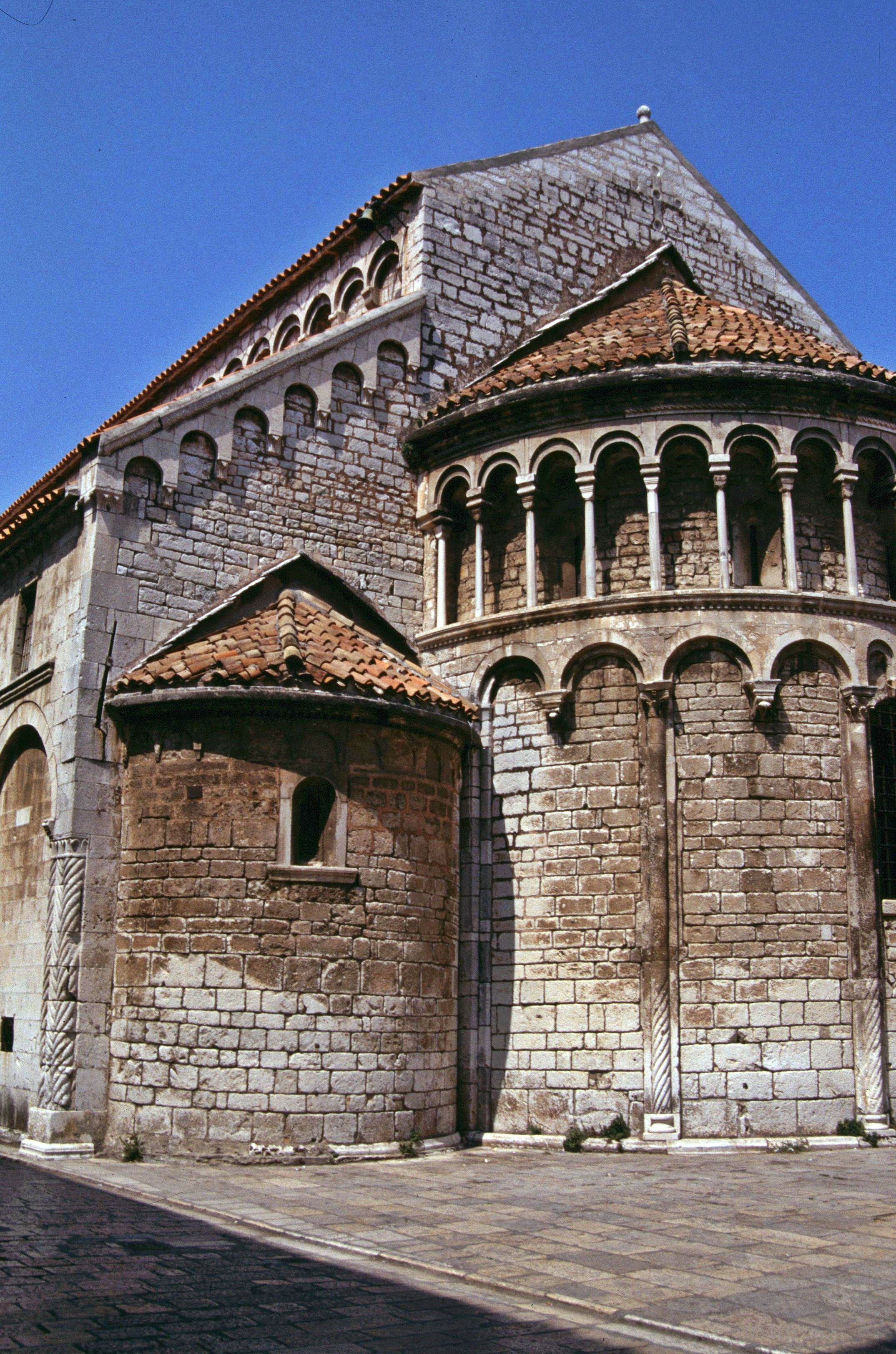 Zadar: Sveti Krsevan